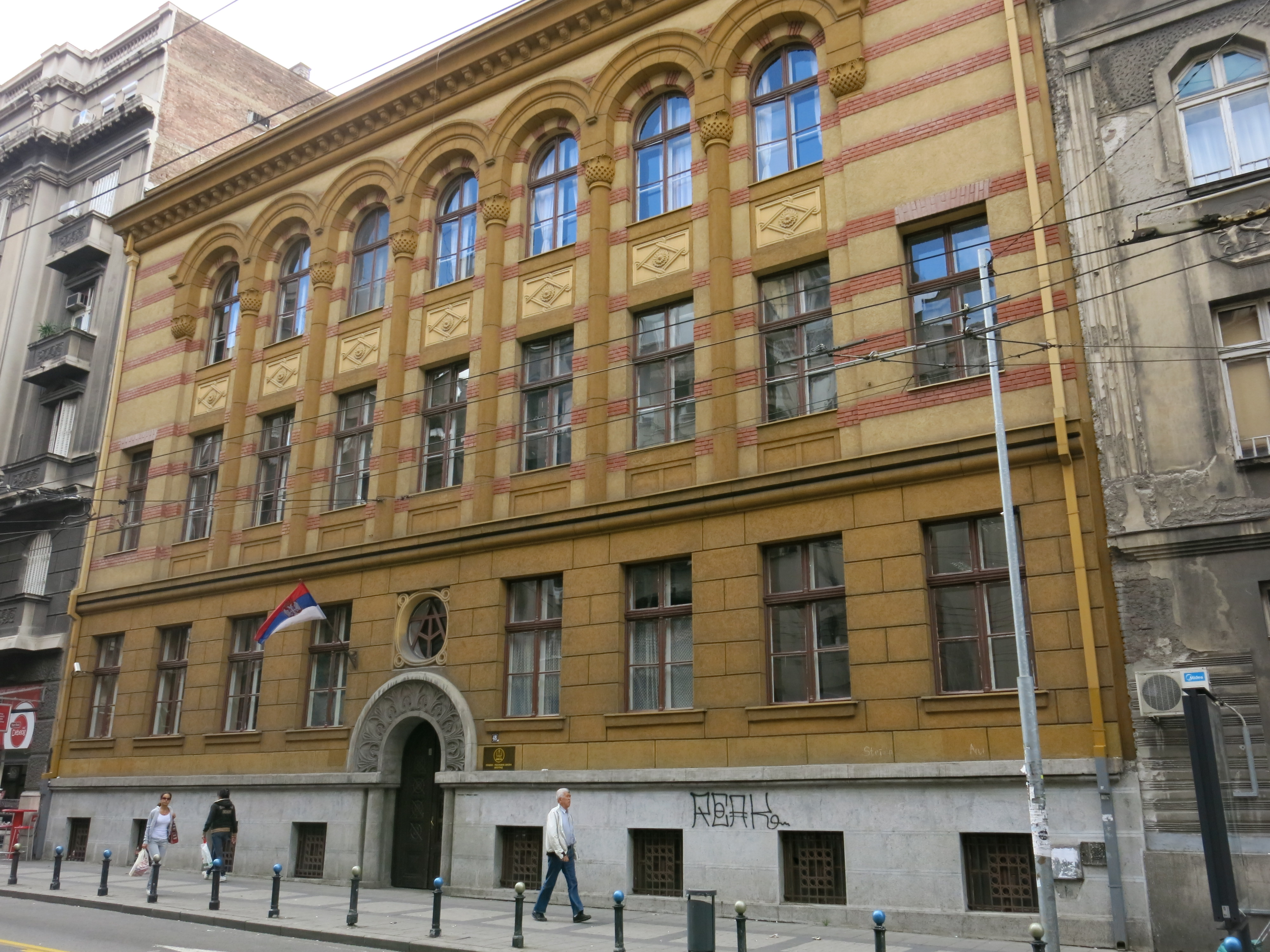 Зграда Трговачке академије